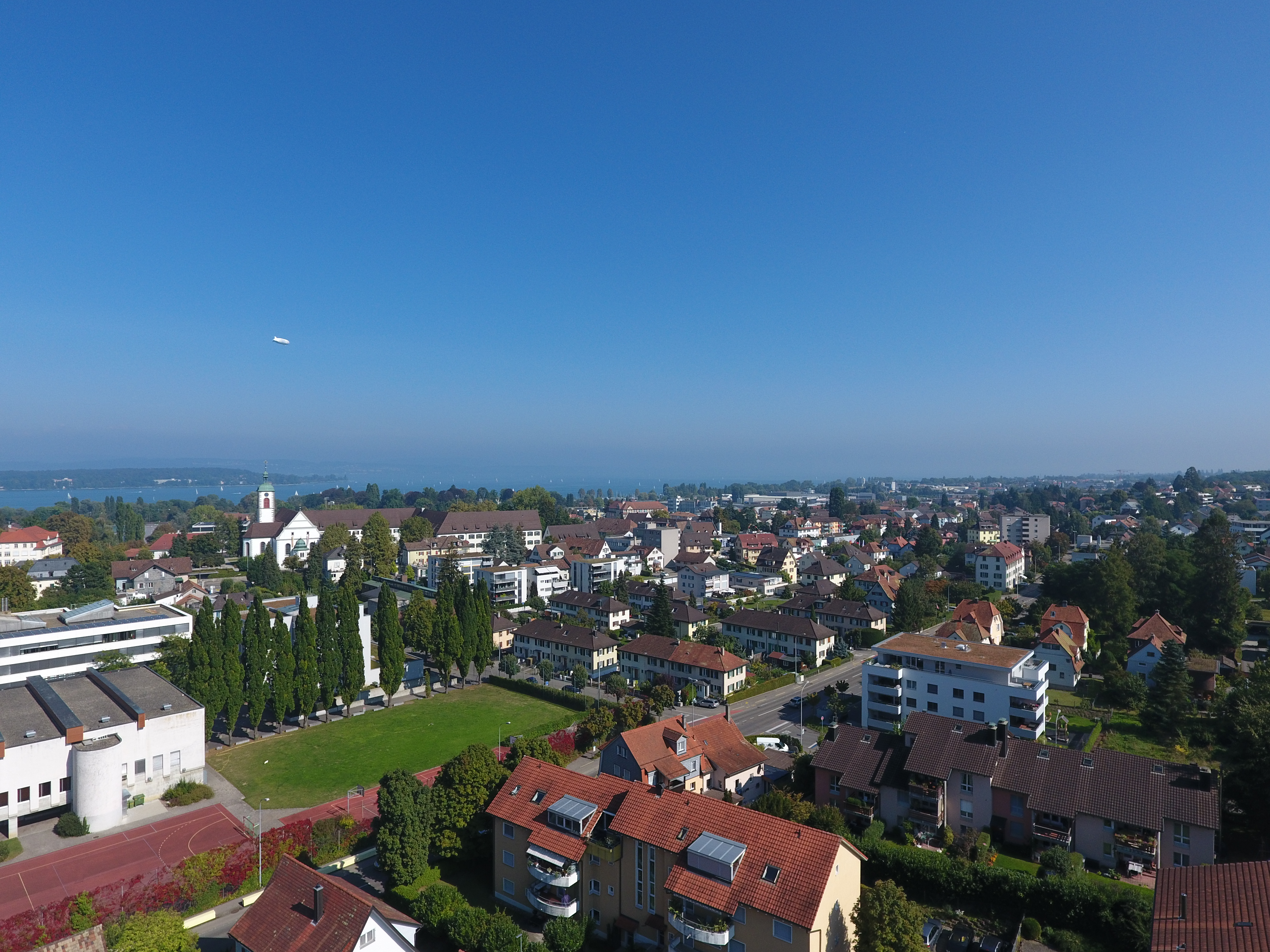 Kreuzlingen